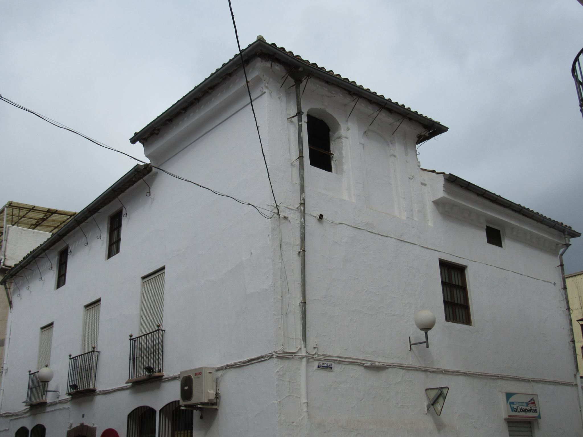 Desde el siglo XVII y hasta la desamortización del siglo XIX, los obispos de Jaén poseyeron una casa palacio en Valdepeñas de Jaén que ocupaban en la época estival. El palacio y los jardines ocuparon una amplia manzana del centro de la localidad. En la actualidad solo se conserva el lado sur, haciendo esquina a las calles Parras y Obispo Melo.